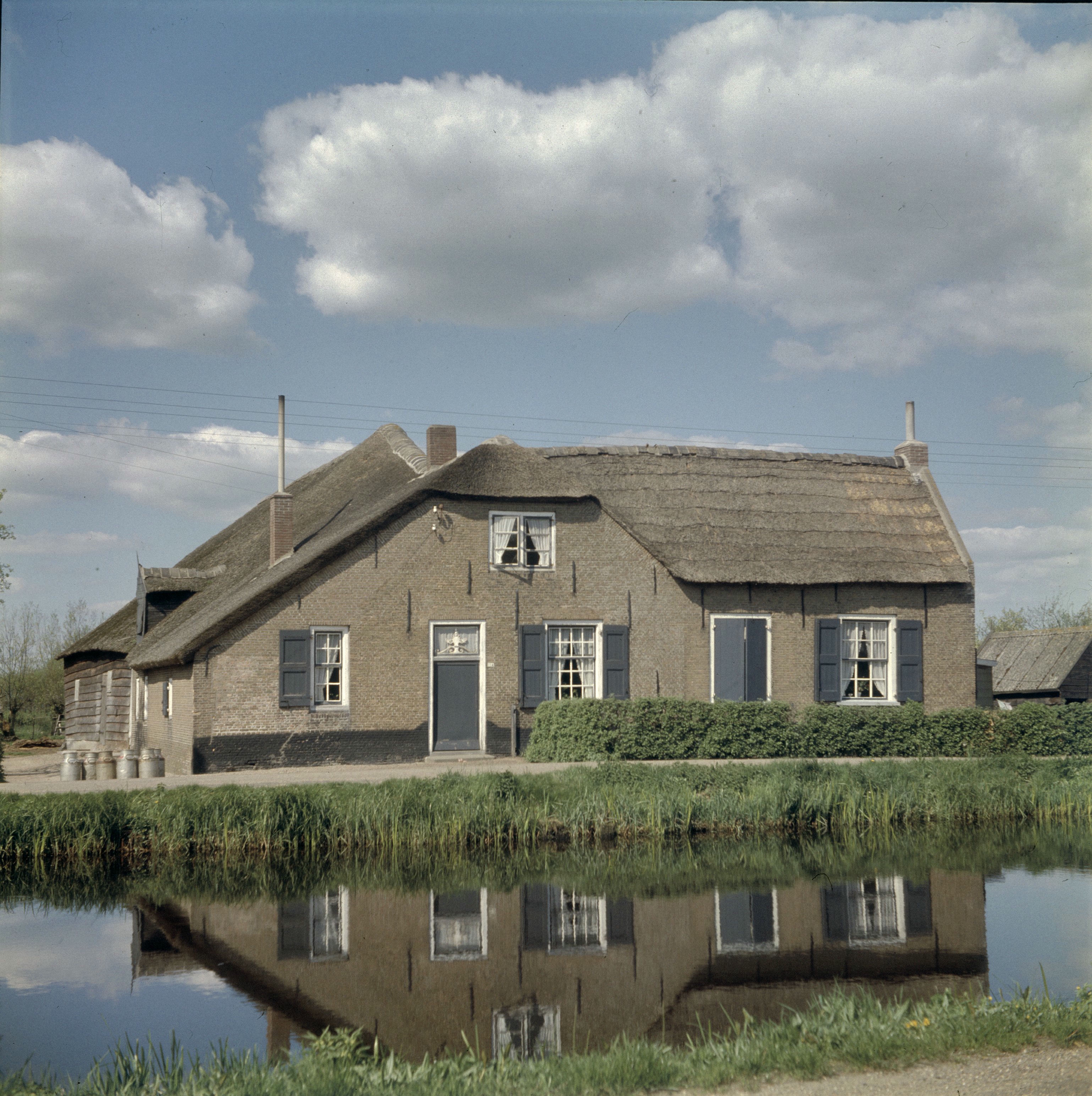 Boerderijen: Overzicht boerderij, voorgevel